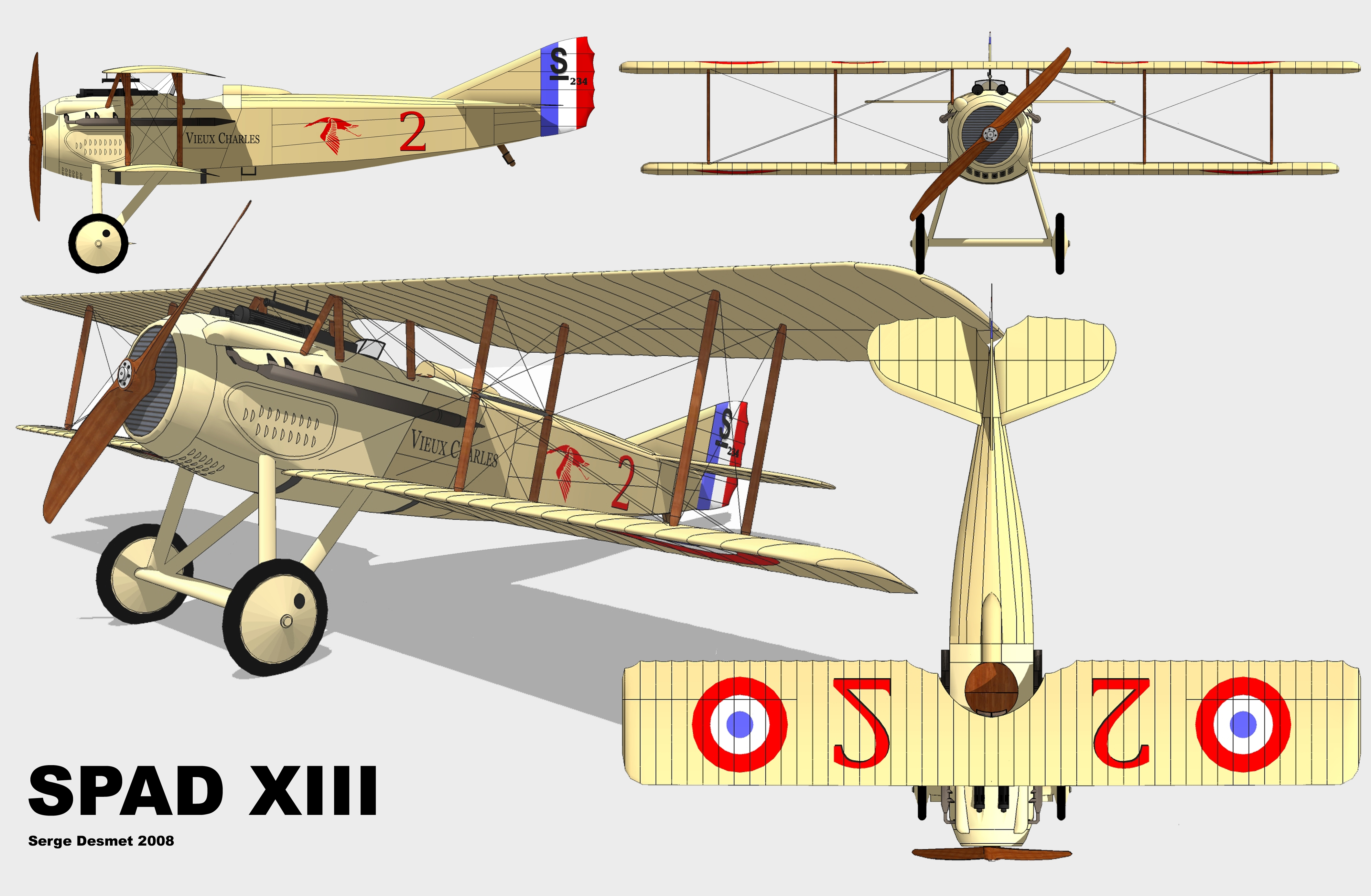 Plan 3 vues du SPAD XIII